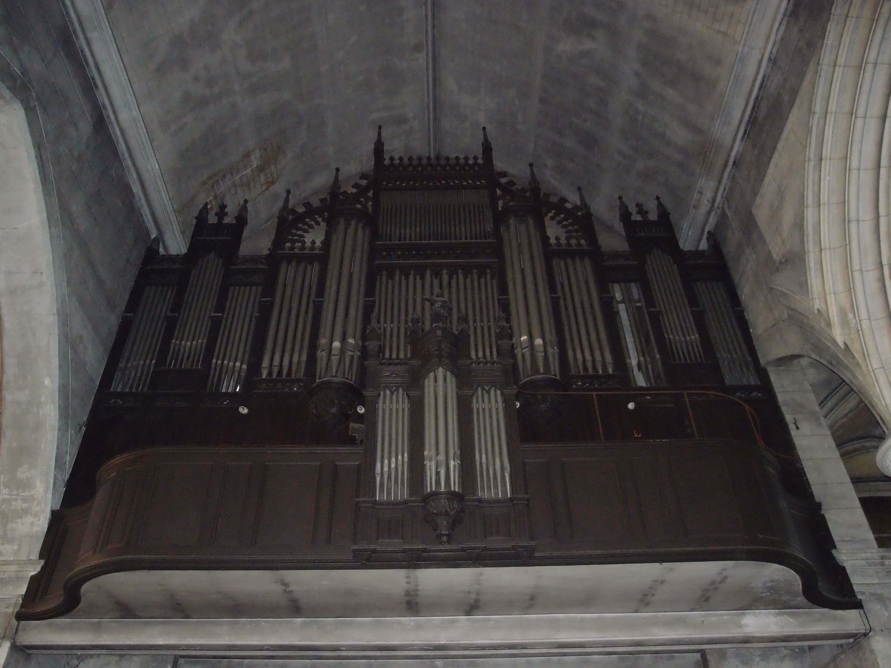 Fécamp: Kirche Saint-Etienne - Orgel (franz.: Église Saint-Étienne de Fécamp) Datum: 15.05.2012 Urheber: M. Pfeiffer alias Benutzer:Gordito1869 Quelle: privates Fotoarchiv des Urhebers